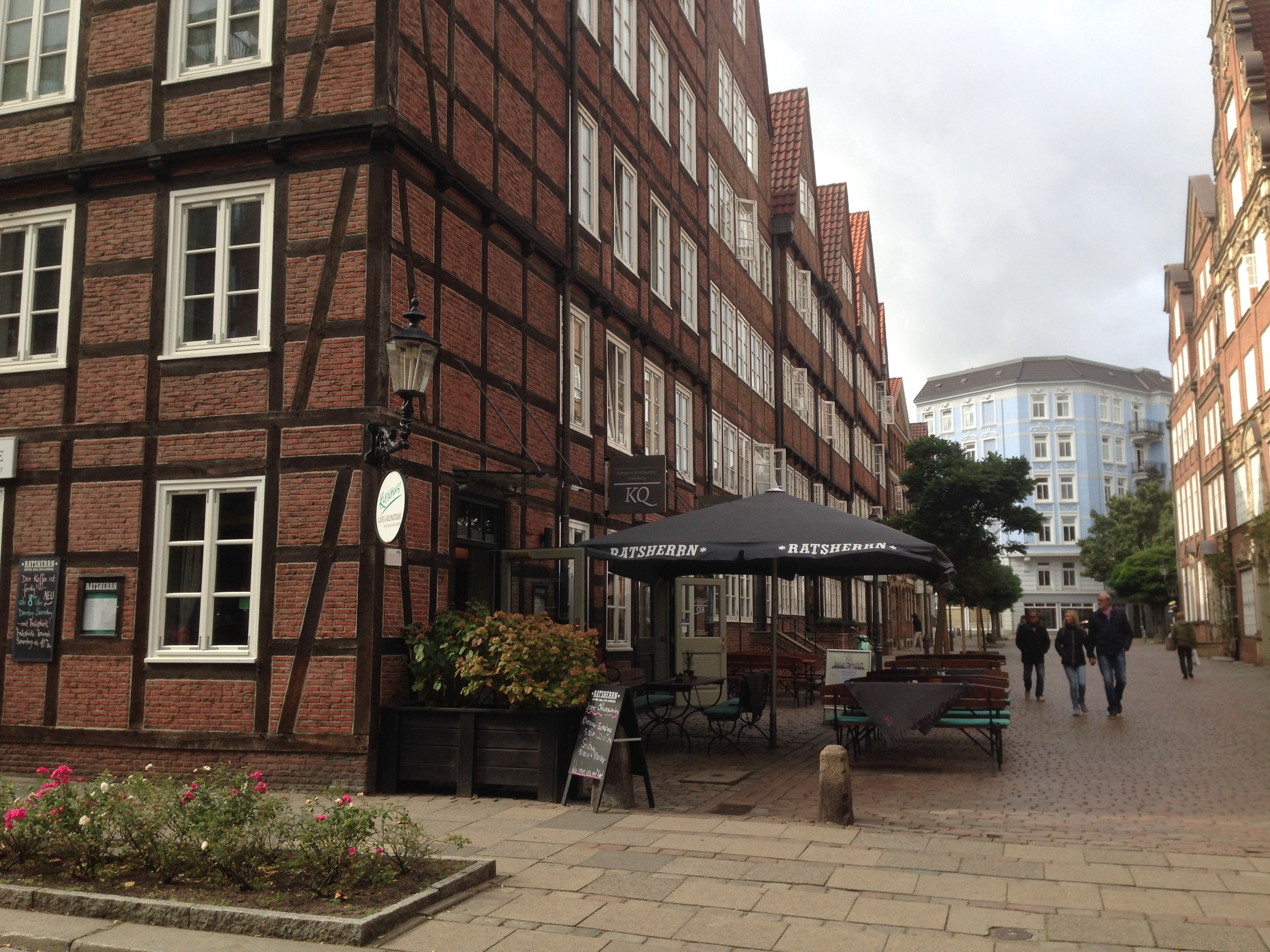 Peterstraße 29 Hamburg, KomponistenQuartier Hamburg